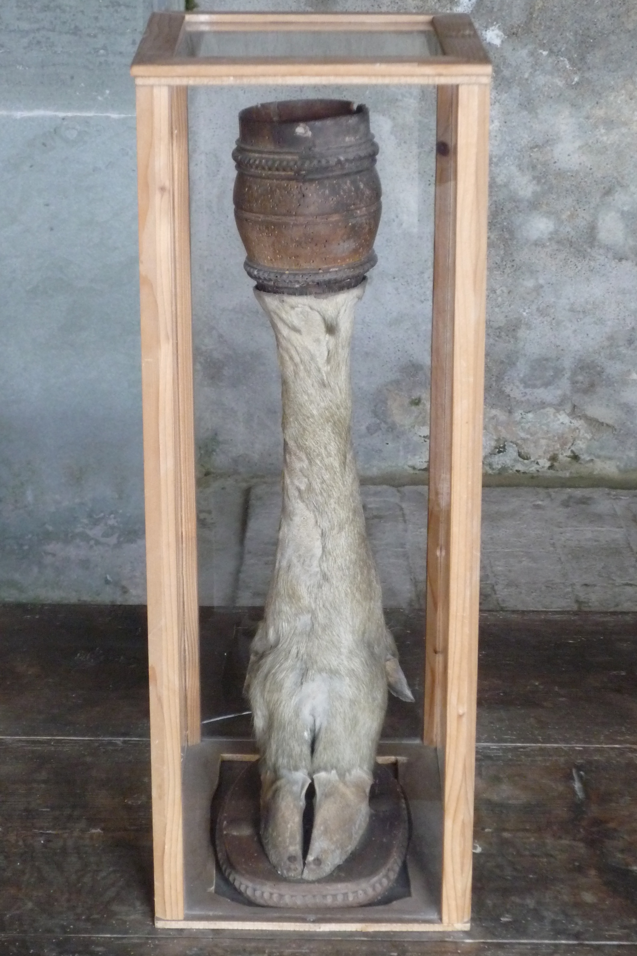 Trinkgefäß in Form eines Elchfußes in der Burg Meersburg